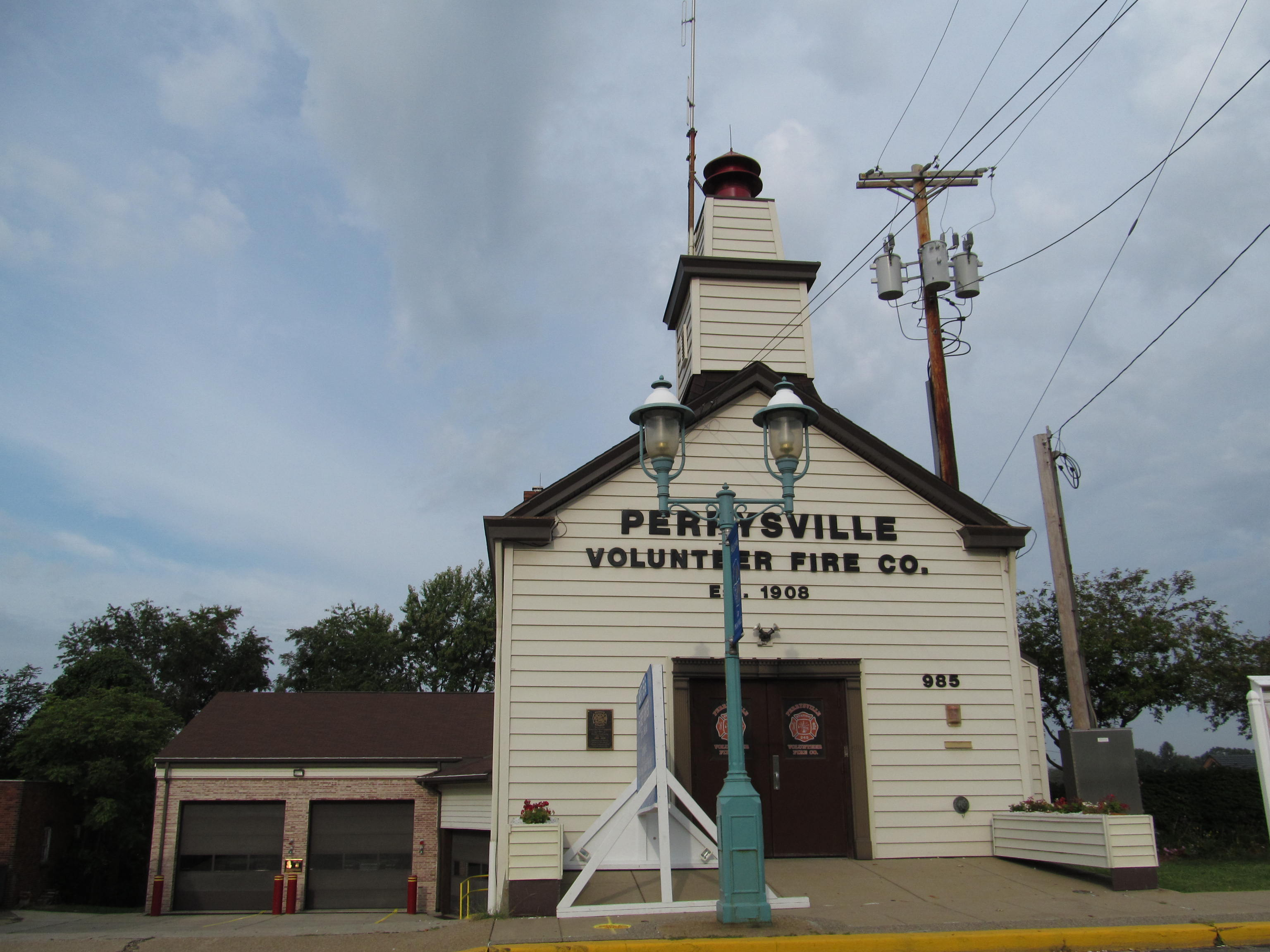 Perrysville, Pennsylvania